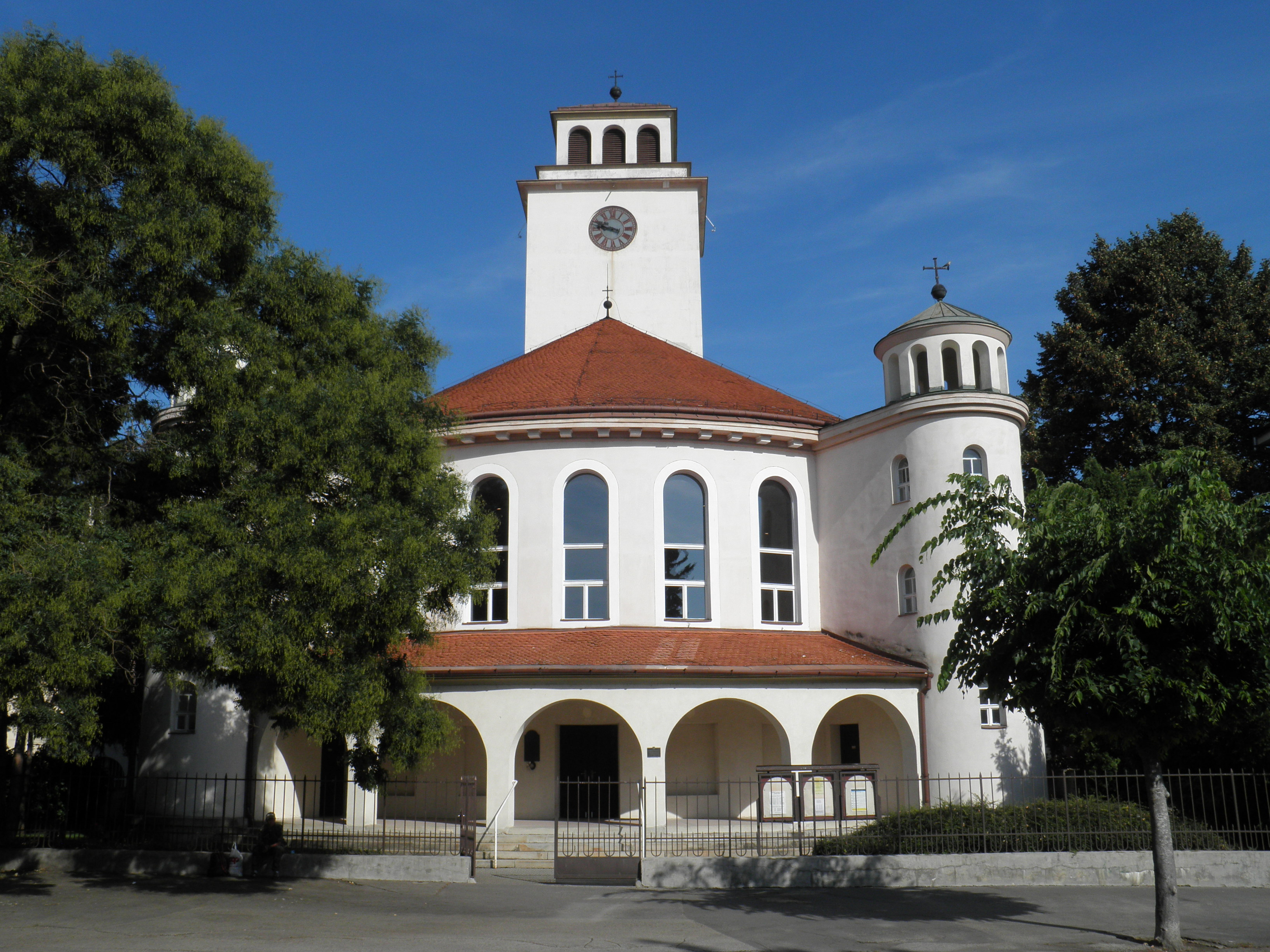 Trnava